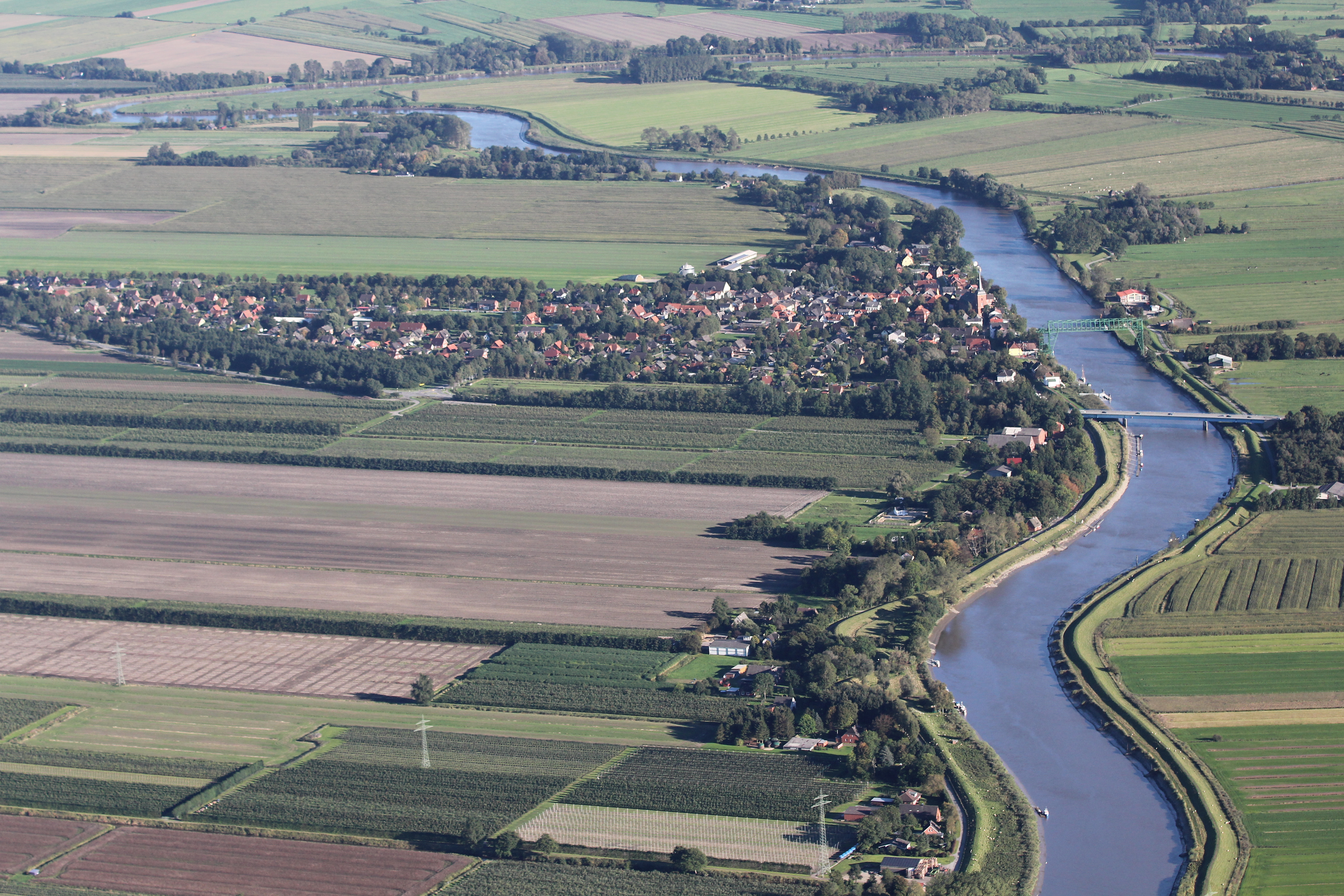 Luftbild: Osten im Landkreis Cuxhaven